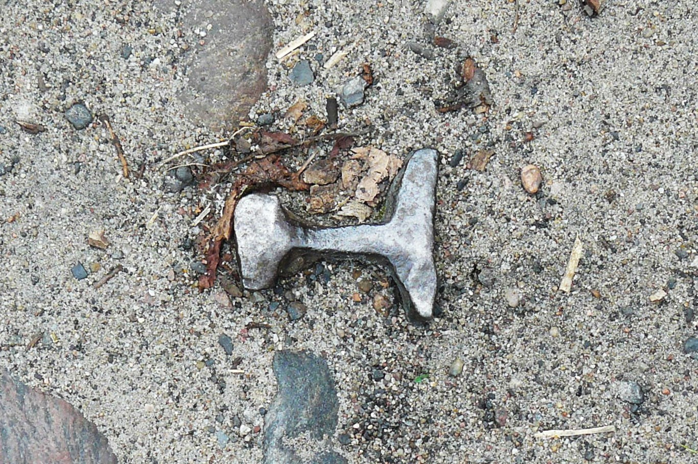 Młyn Dahlmanna w Obornikach (także Młyn Słonawy).